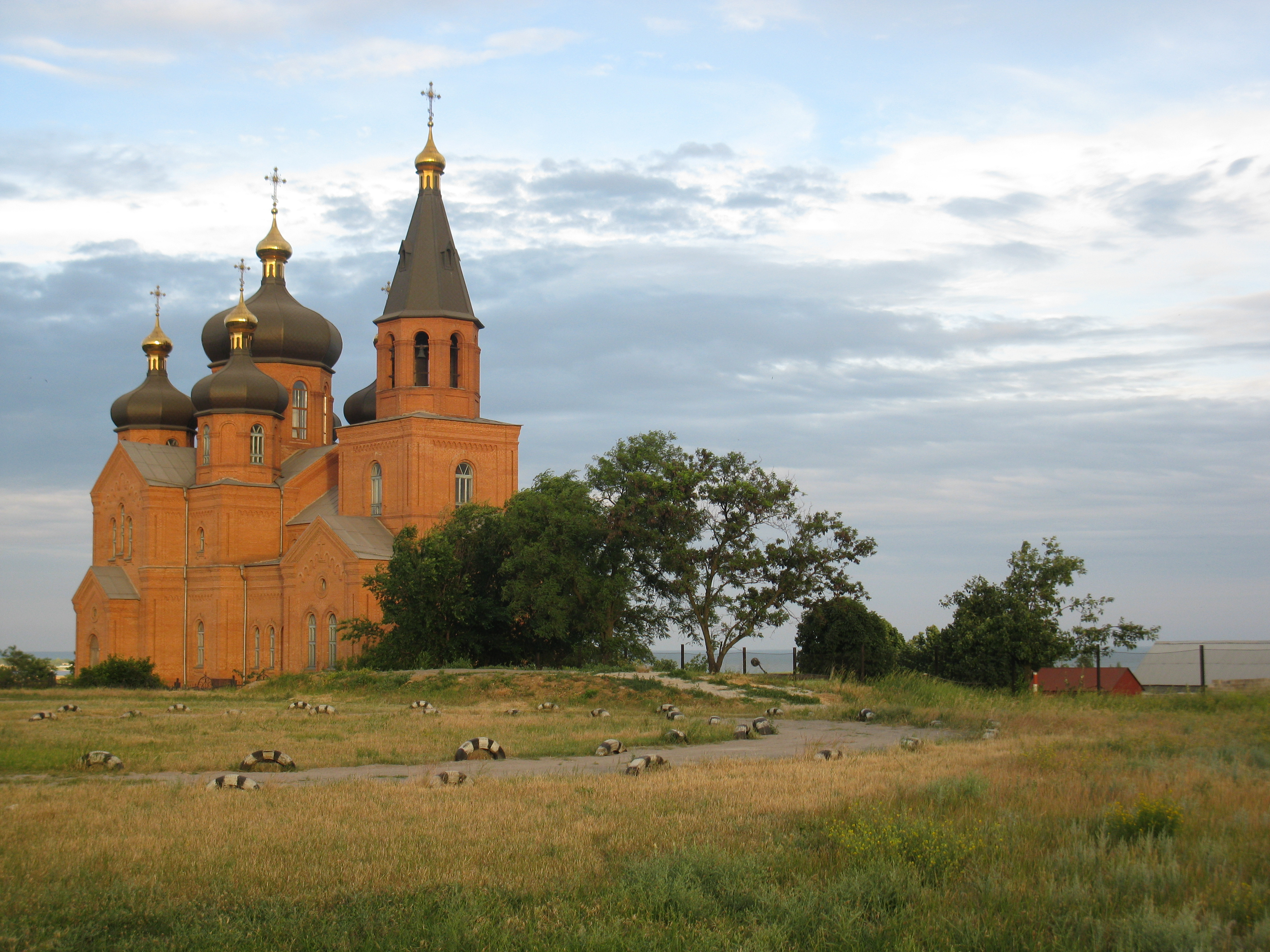 г. Мариуполь